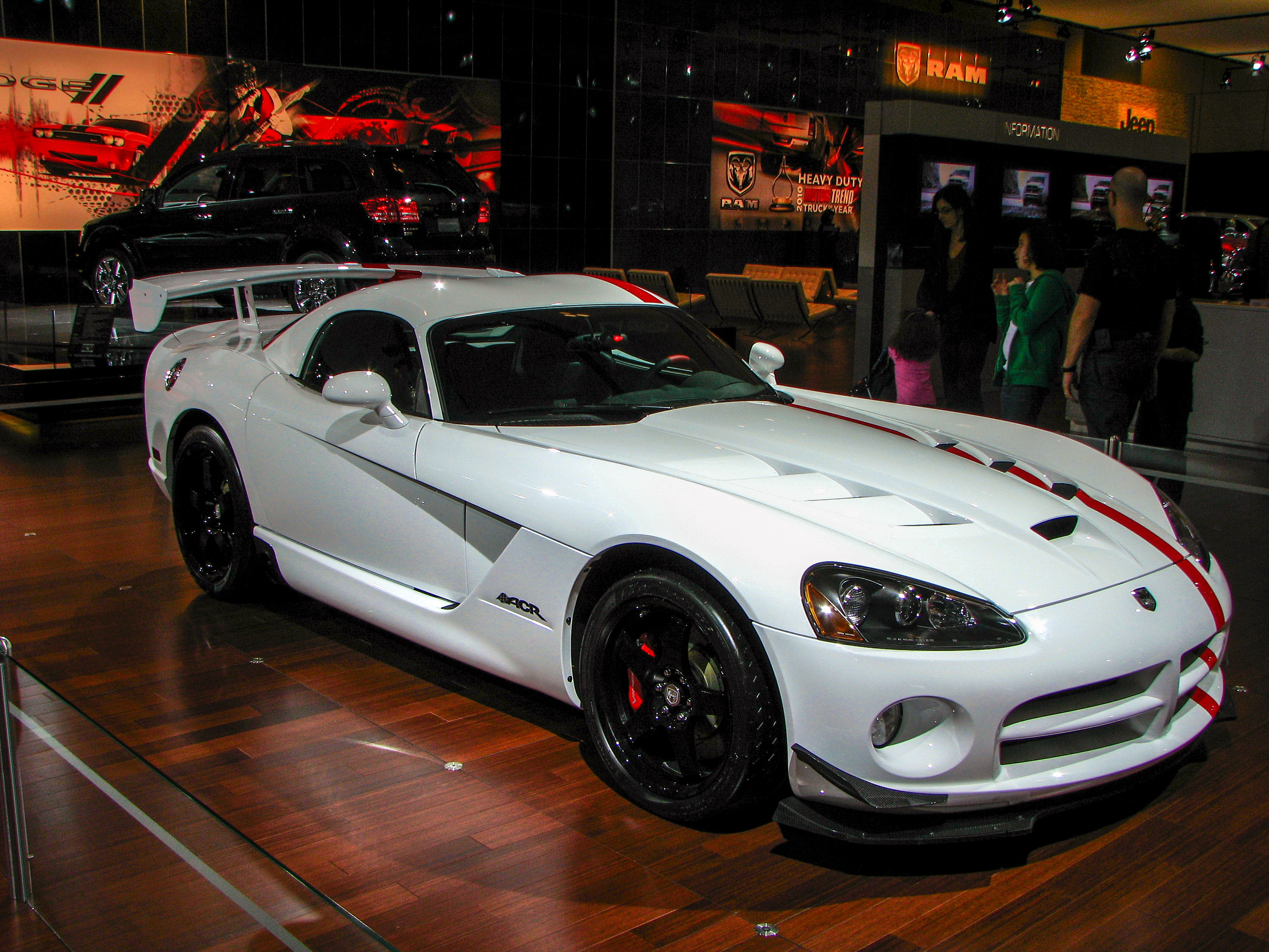 Dodge Viper